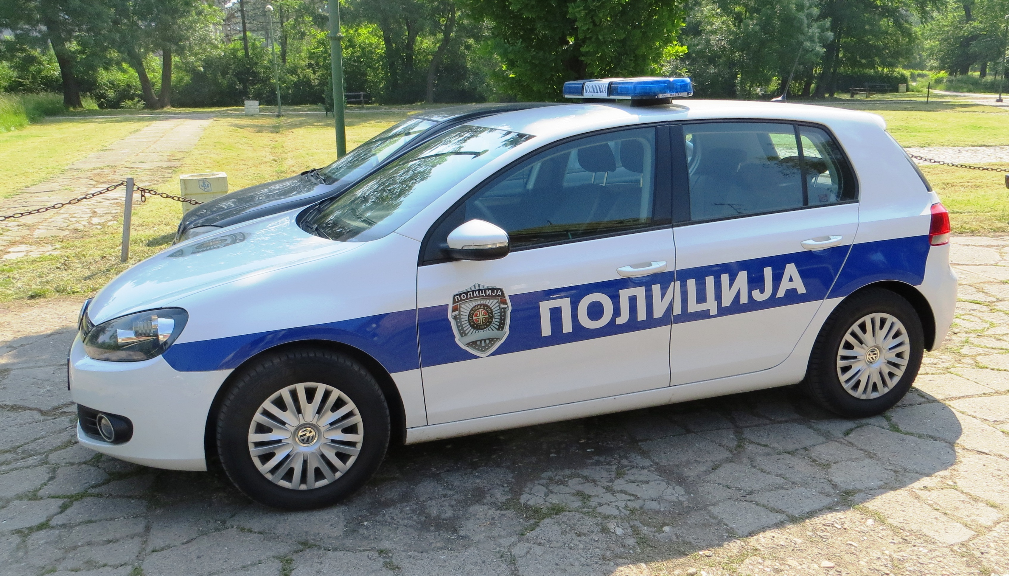 Politieauto uit Servië